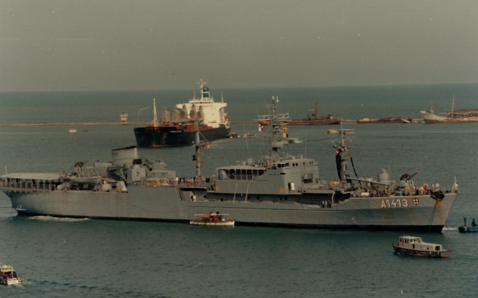 Troßschiff Freiburg 1991, einlaufen Port Said, Ägypten